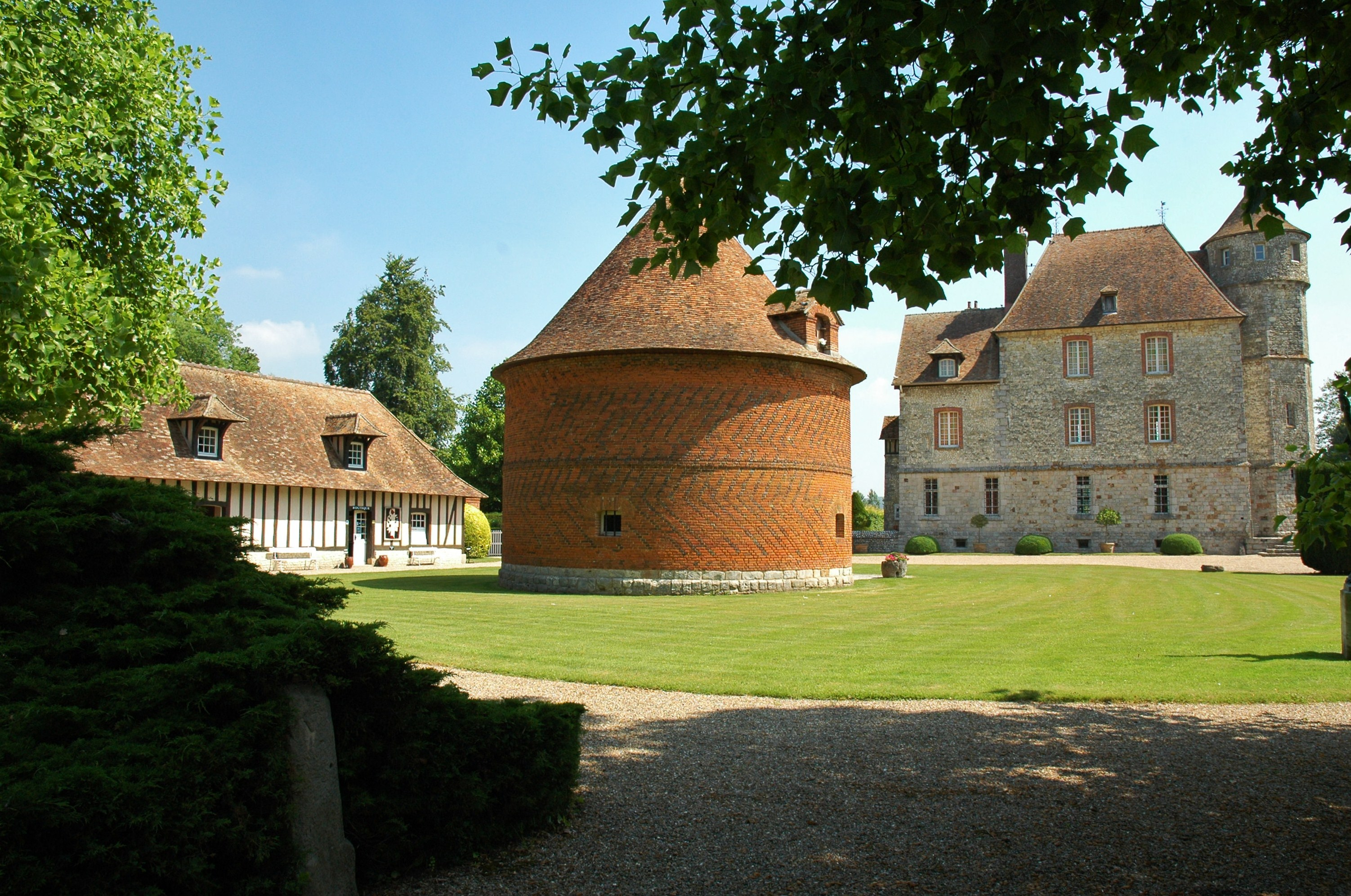 Le château de Vascoeuil, Eure, Normandie, France